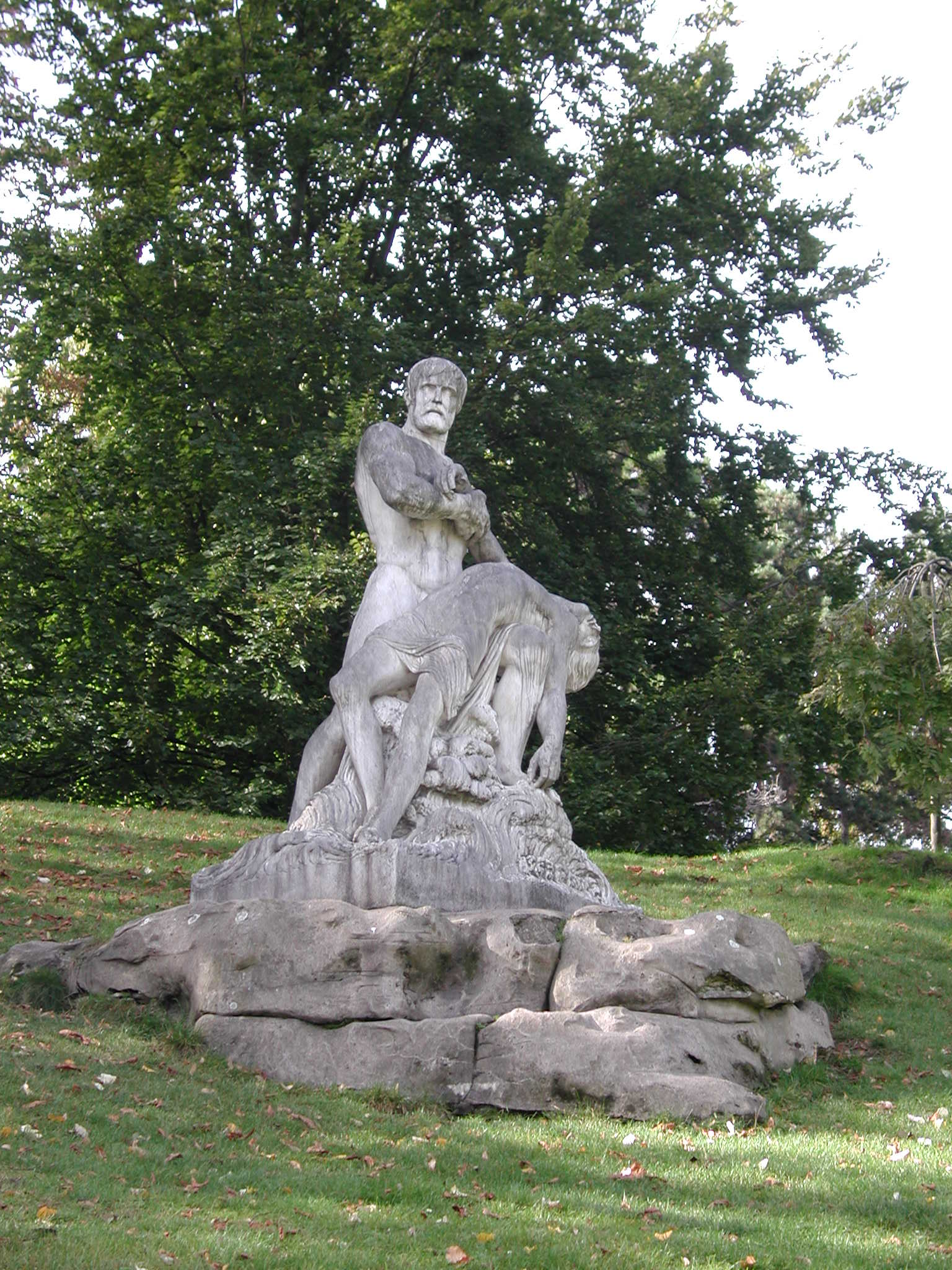 Antoine Étex (Français, 1808-1888): Les Naufragés, 1859, groupe en marbre, Parc Montsouris, XIVe arrondissement, Paris, France. Le modèle plâtre a été exposé sous le titre Le Dévouement au Salon de 1853 (n° 1330)[1]. Le marbre, qu'Étex envoie à l'exposition universelle de 1867[2], n'est acquis et placé au parc Montsouris qu'en 1886. Sur d'anciennes cartes postales représentant le parc l'œuvre figure sous le titre Le Sauveteur. ↑ Gustave Le Gray (1820-1884), Vue du Salon de 1853, photographie, Paris, musée d'Orsay (voir en ligne). ↑ Entrée Etex, Antoine, In Grand dictionnaire universel du XIXe siècle français .., Larousse et Boyer, Paris, 1870, p. 129 (lire en ligne)